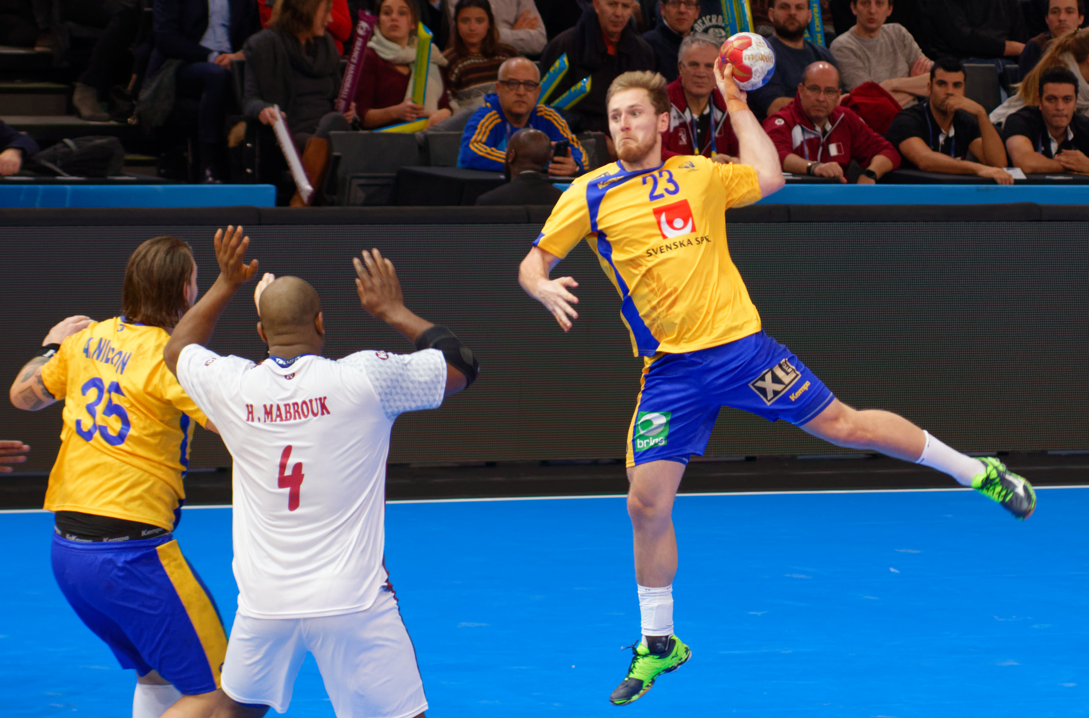 Match de la phase préliminaire du championnat du monde masculin de handball 2017 entre la Suède et le Qatar (Groupe D). A Bercy, le 18 janvier 2017.